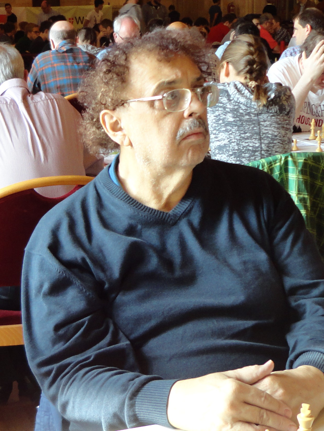 Walter Wittmann, Vienna Chess Open 2015 in Wien.